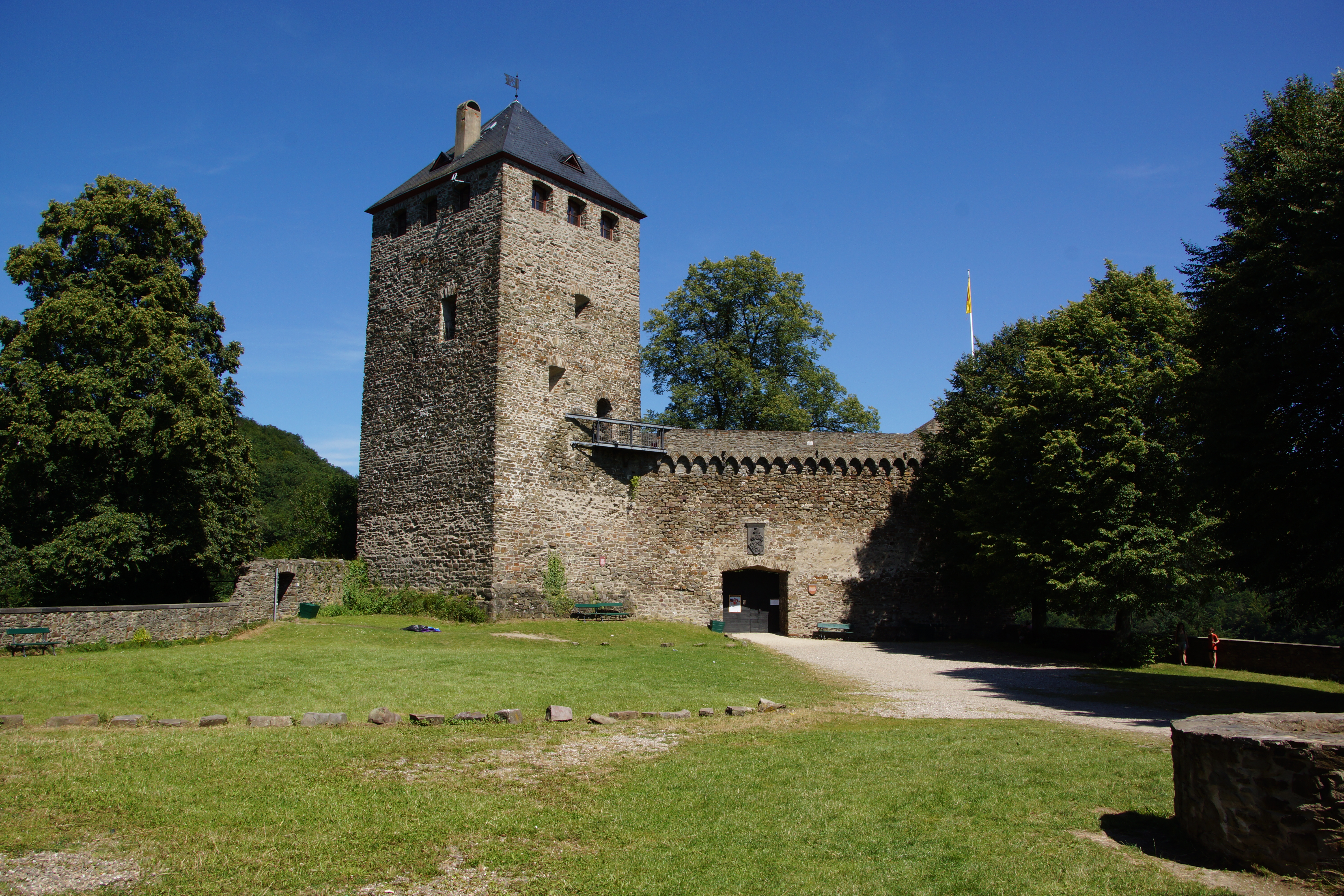 Bergfried Burg Sayn in Bendorf